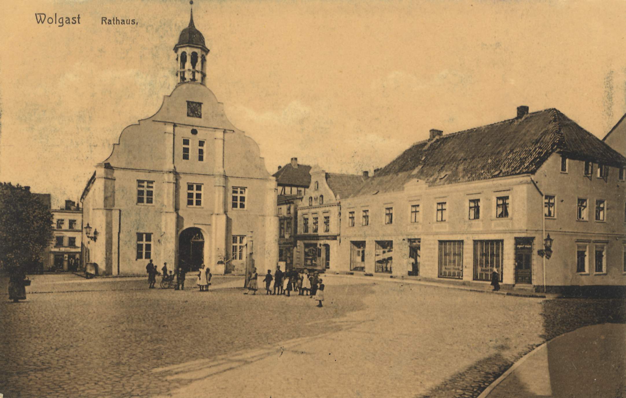 Rathaus